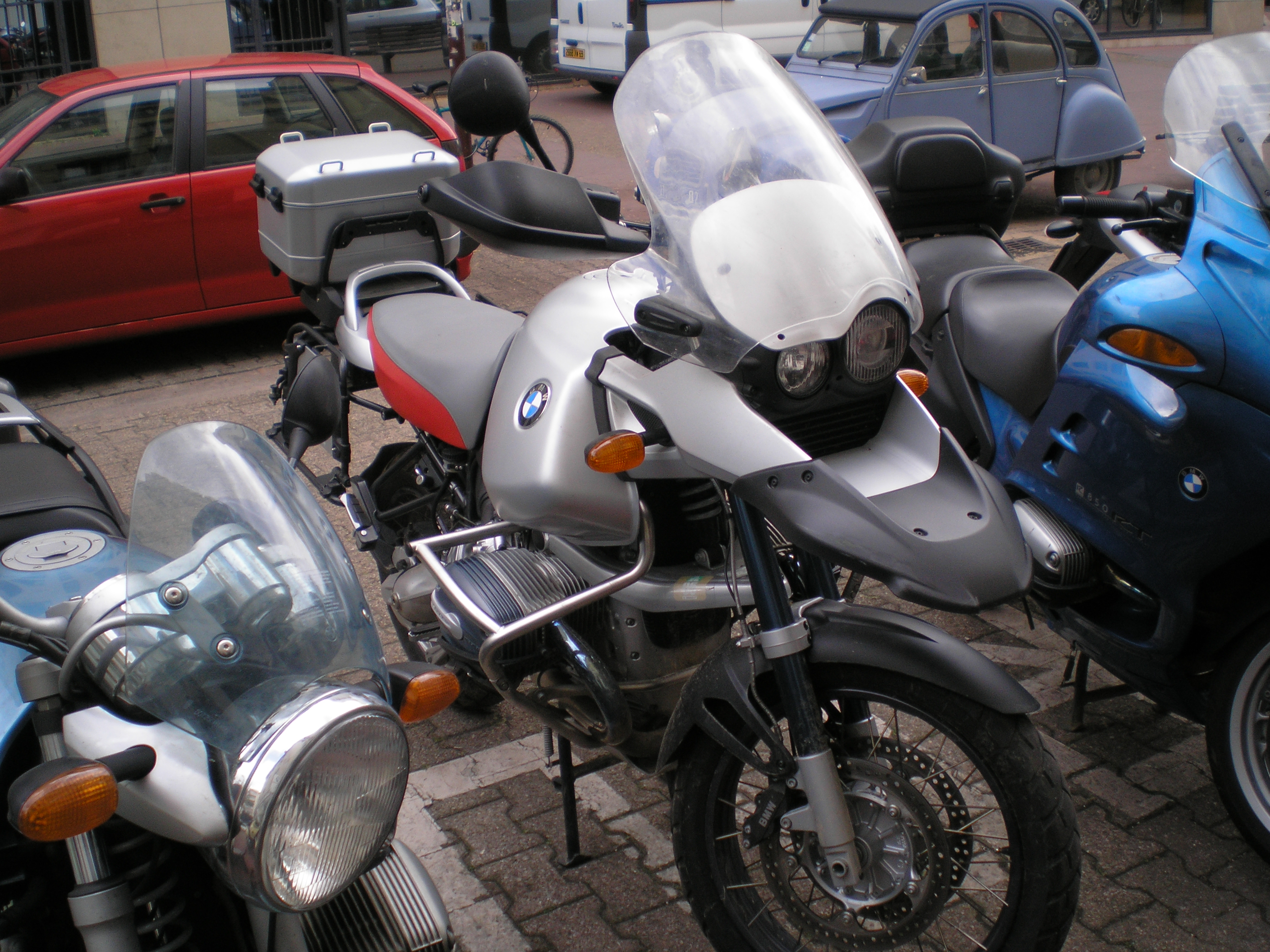 BMW R1150GS Adventure